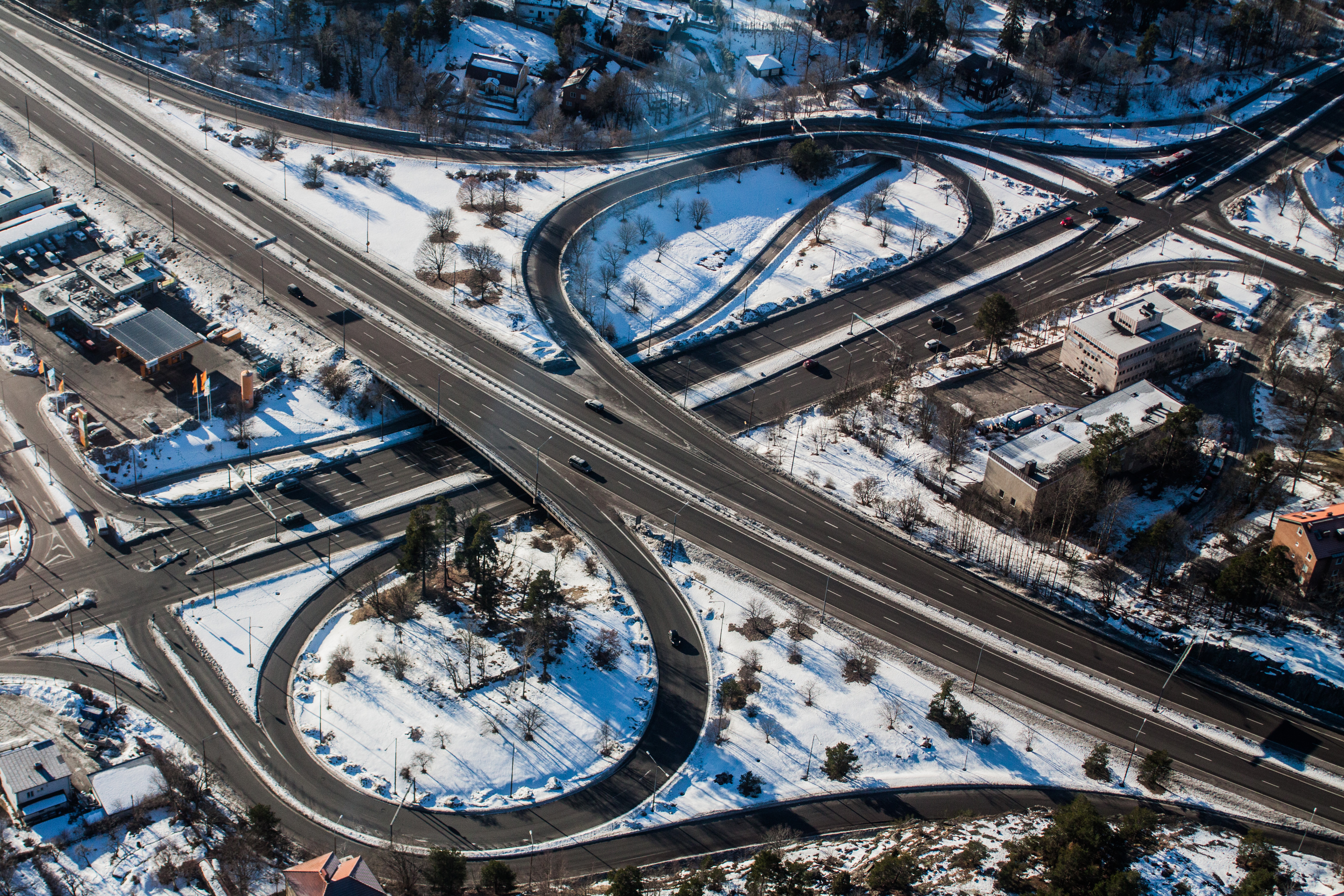 Flygbilder över Stockholms Skärgård arrangerad av Wikimedia.